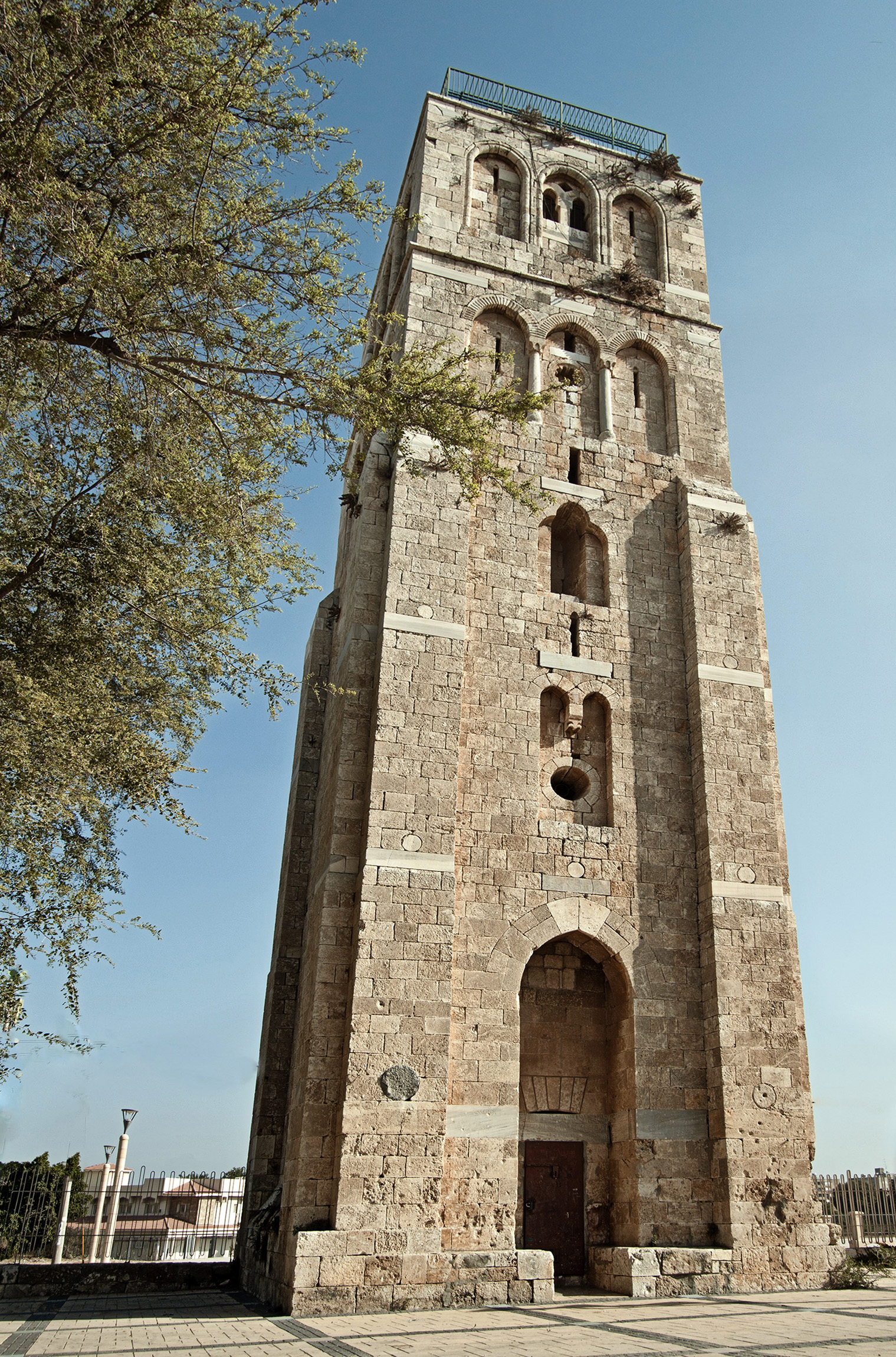 המסגד הלבן ברמלה הוא מבנה אסלאמי קדום, ששורשיו נעוצים בראשית המאה ה-8, בתקופת שלטונם של ח'ליפי בית אומיה. המסגד עבר מספר שינויים במהלך השנים, והבולט שבהם הוא הקמת המינרט הידוע בשם "המגדל הלבן" שנוסף לו בתקופה הממלוכית.